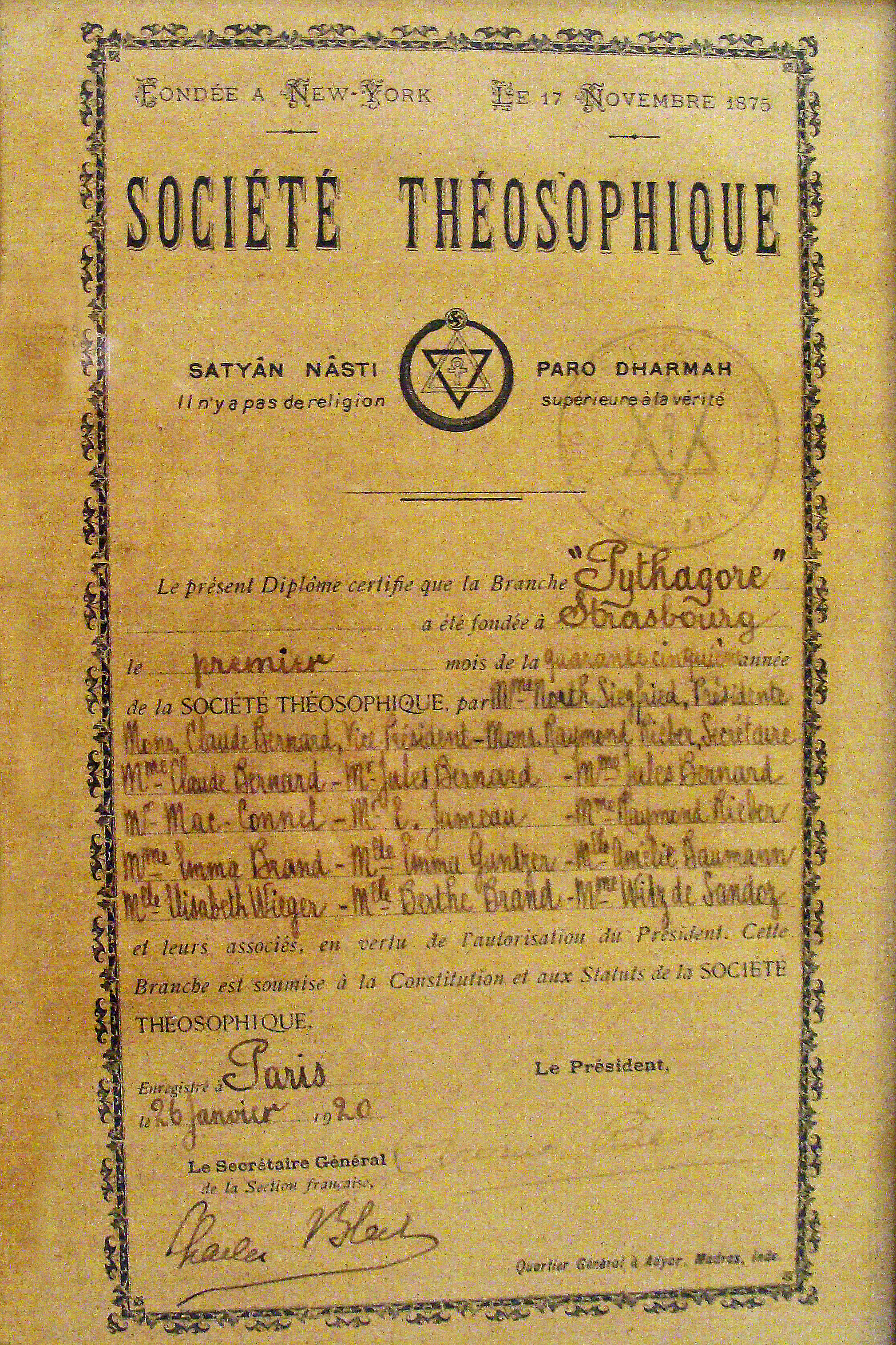 Diplôme fondateur de la Société Théosophique "Pythagore" de Strasbourg fait le 26 janvier 1920 sous la présidence de la fondatrice Marthe North-Siegfried (1866-1939) et de la vice-présidence de Claude Bernard.